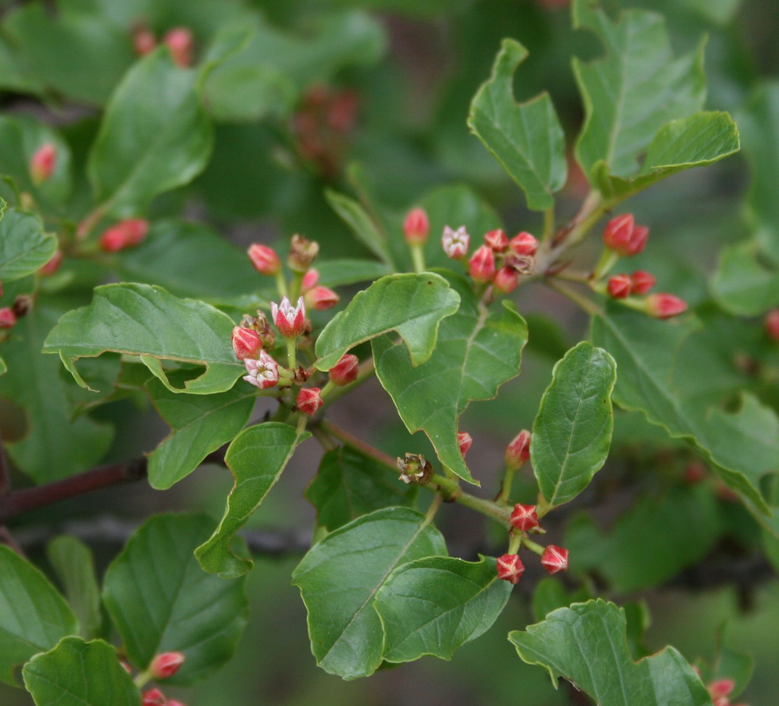 Frangula rupestris, Kreuzdorngewächse (Rhamnaceae) - Italien/Italia/Italy: Friuli-Venezia Giulia, Prov. Trieste, Rilkeweg/Sentiero Rilke von Sistiana nach Duino